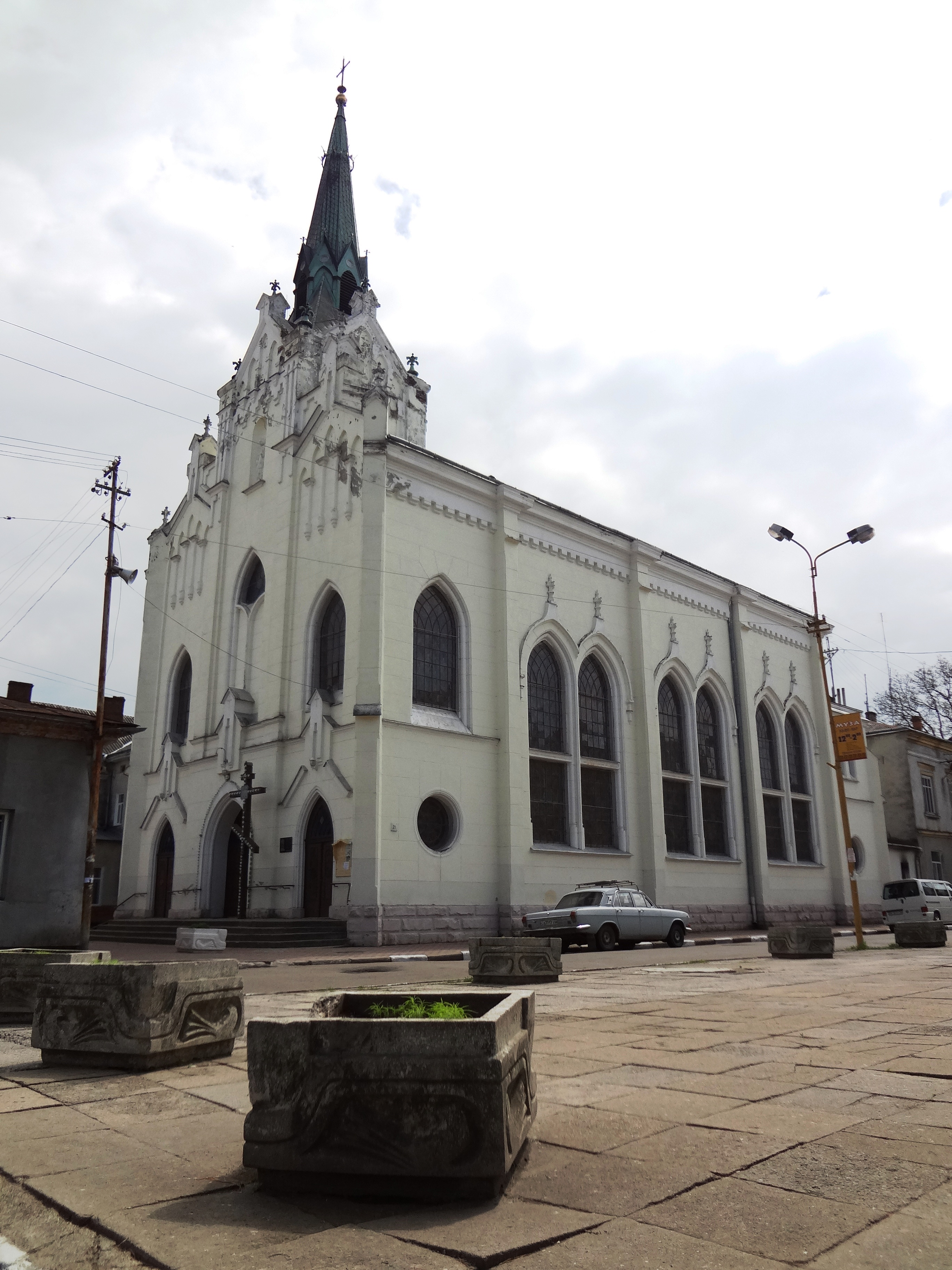 Костел Св.Михаїла (мур.), Стрий, вул. Крушельницької,21